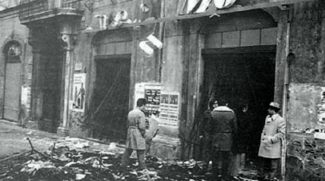 Moti dell'Aquila (febbraio 1971): vetrine in frantumi e negozi saccheggiati